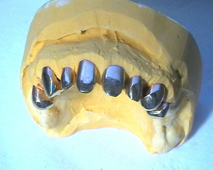 Teleskopprothes, Oberkiefer, gaumenfrei, fast schon eine Teleskopbrücke